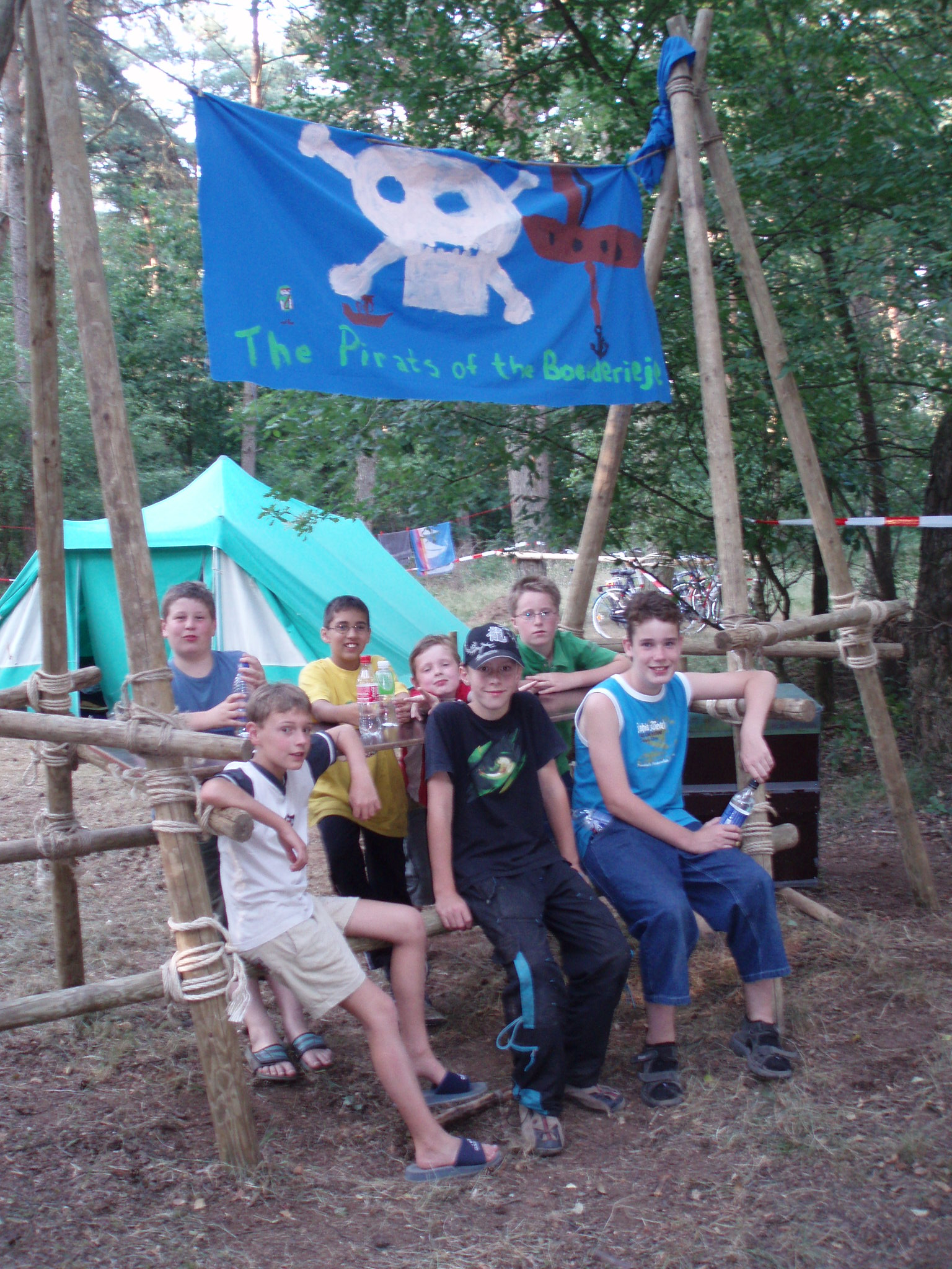 eigen foto 2006 (c) Looi